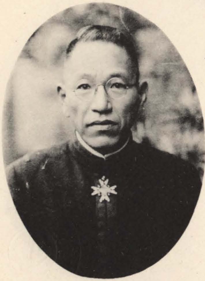 Bân-lâm-gú: 田端幸三郎 Tabata Kōzaburō